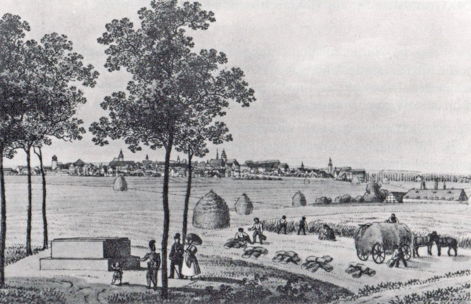 Der 1863 für ein Völkerschlachtdenkmal gelegte Grundstein in Thonberg bei Leipzig (Abzweig Reitzenhainer [heute Prager] und Naunhofer Straße)